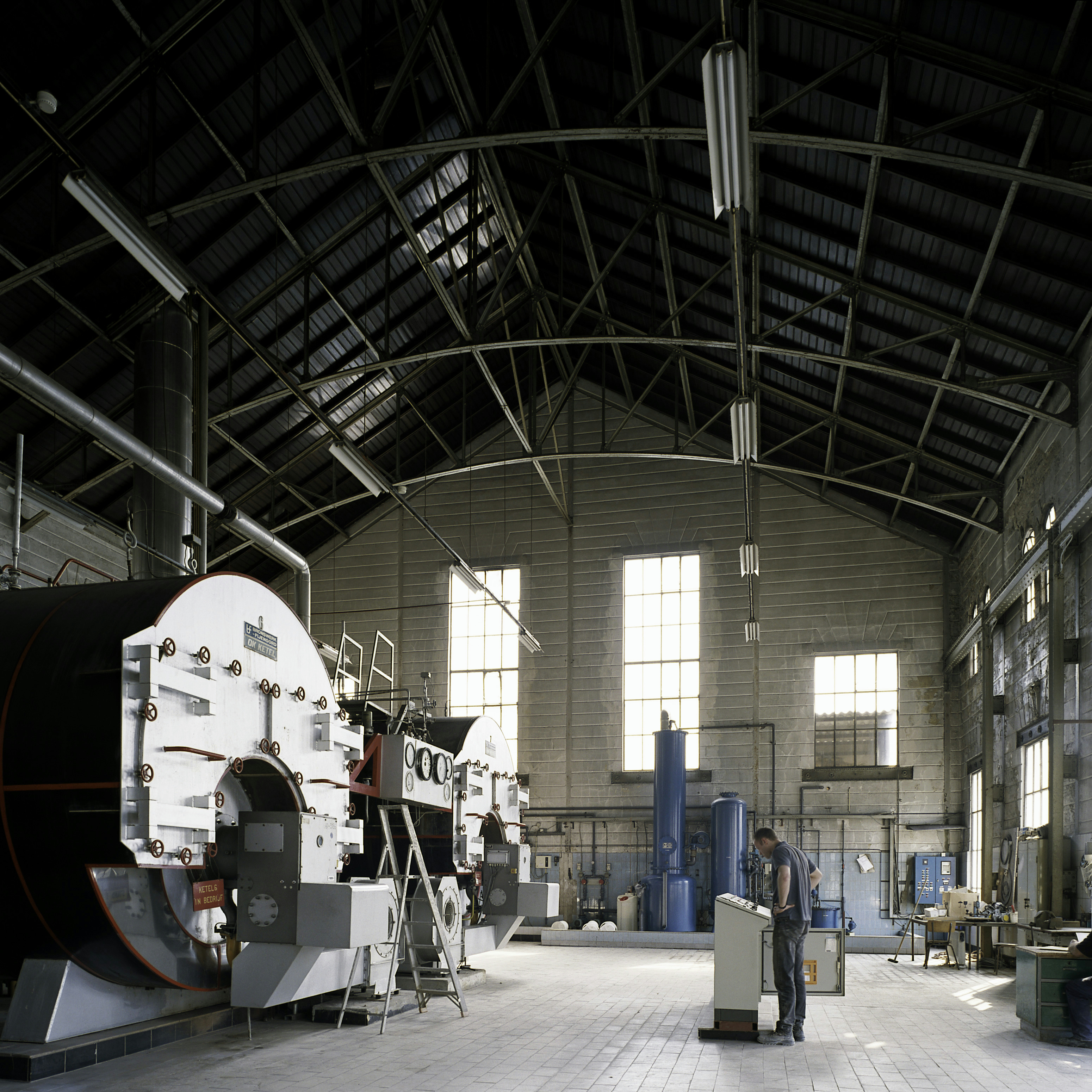 Timmerfabriek: Interieur, overzicht van het ketelhuis